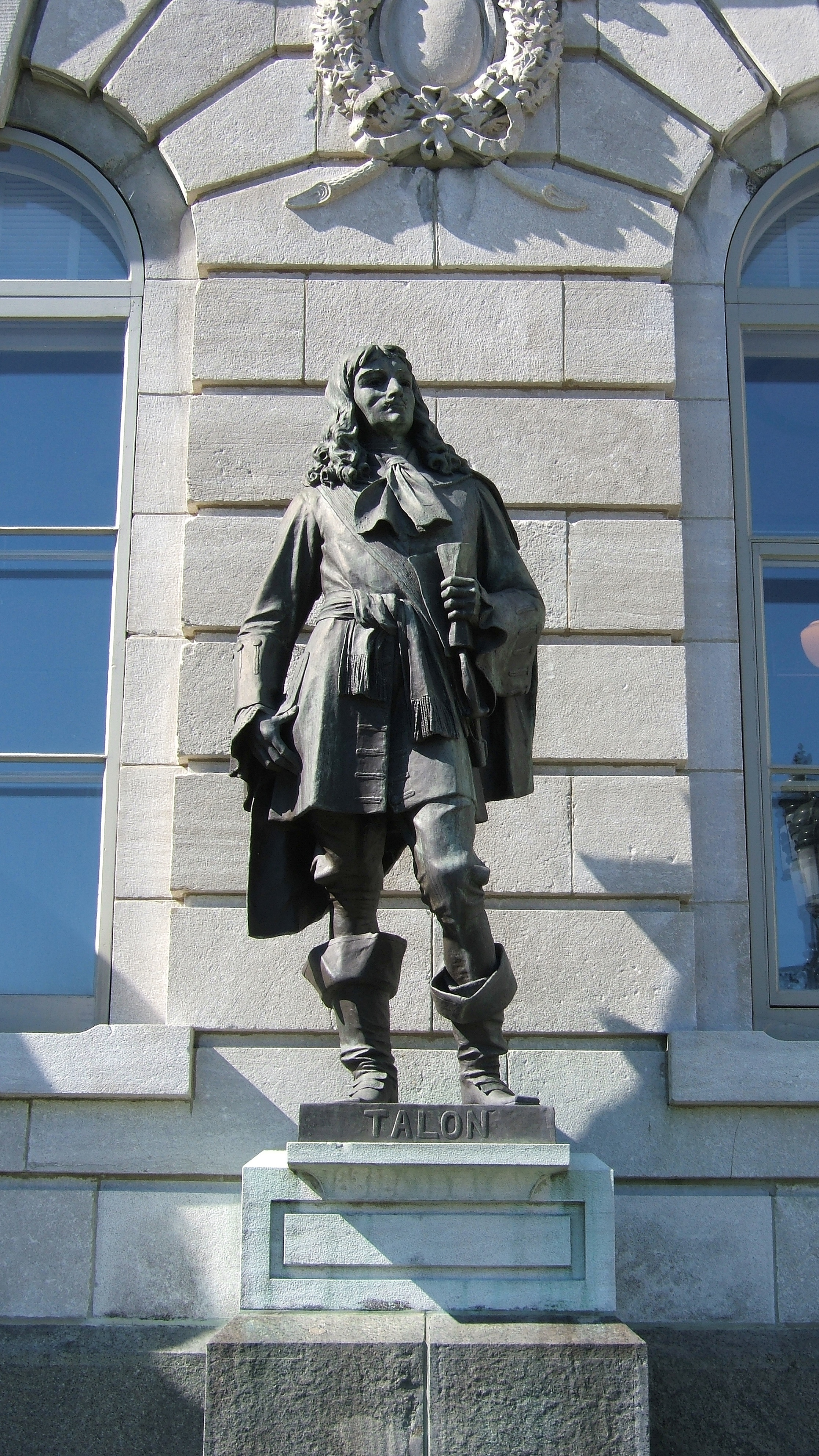 Statue de Jean Talon à l'assemblée Nationale au Québec.